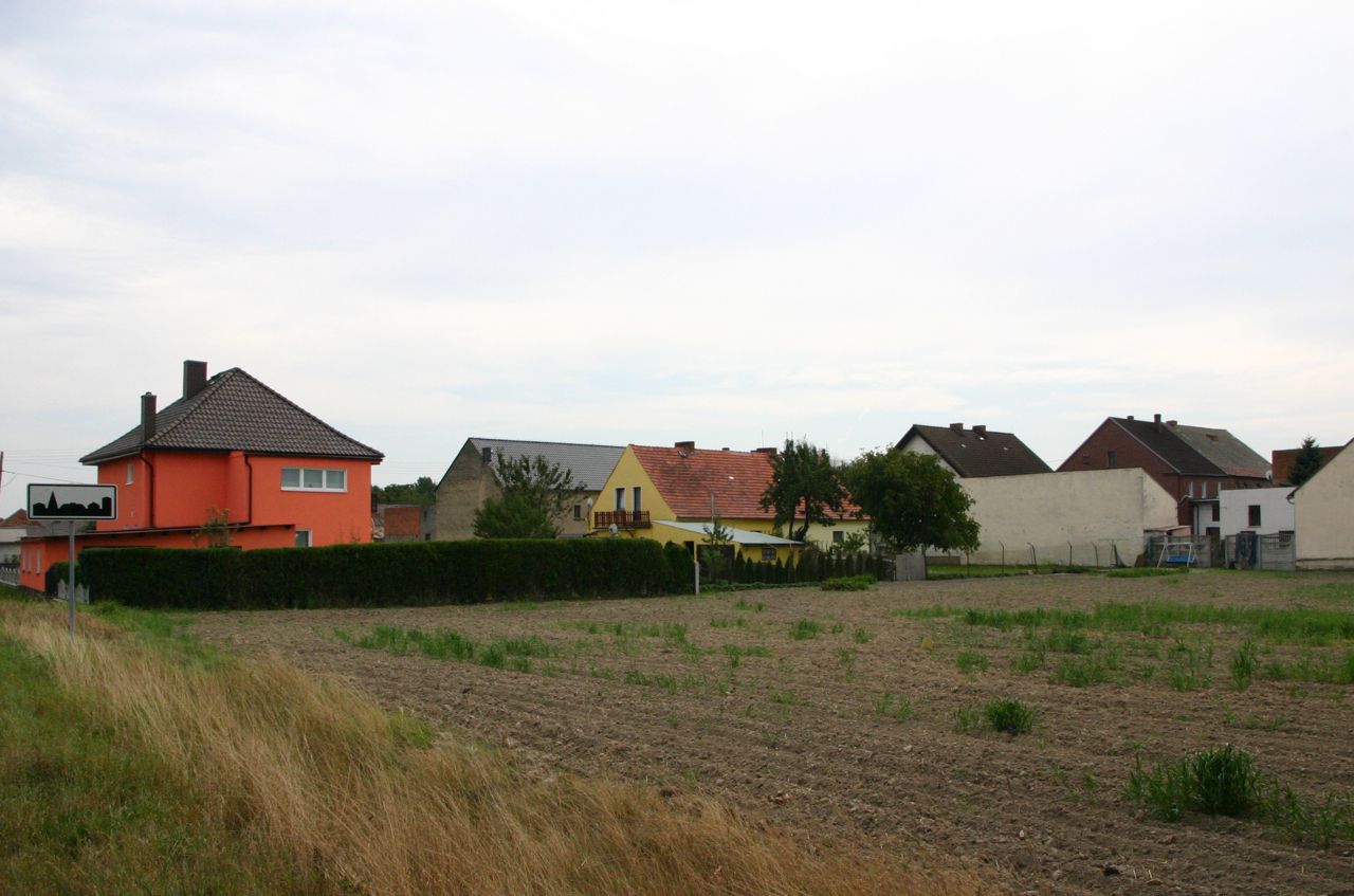 Nowa Wieś Prudnicka (dodatkowa nazwa w j. niem. Neudorf – wieś w Polsce położona w województwie opolskim, w powiecie prudnickim, w gminie Biała.